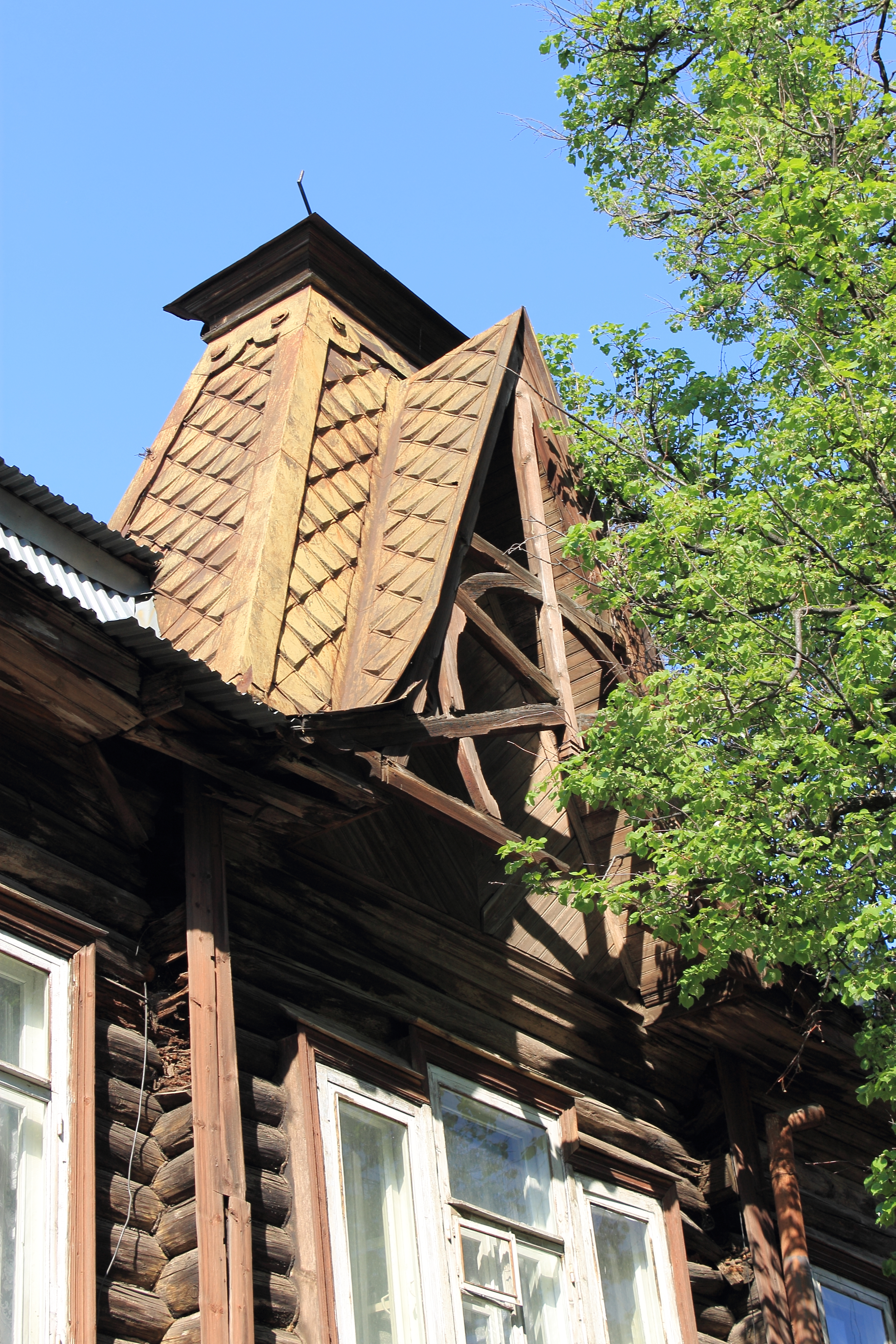 Дом К. Полушкина: улица Грузинская, 34, Нижний Новгород, Нижегородская область